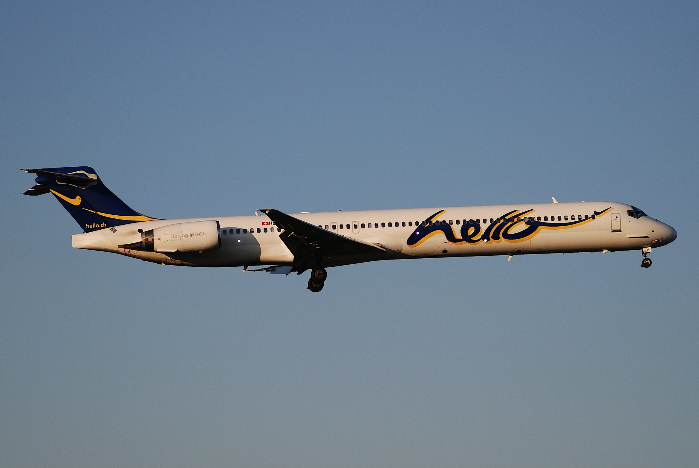 Hello MD-90; HB-JIA@ZRH;14.04.2007/459cw